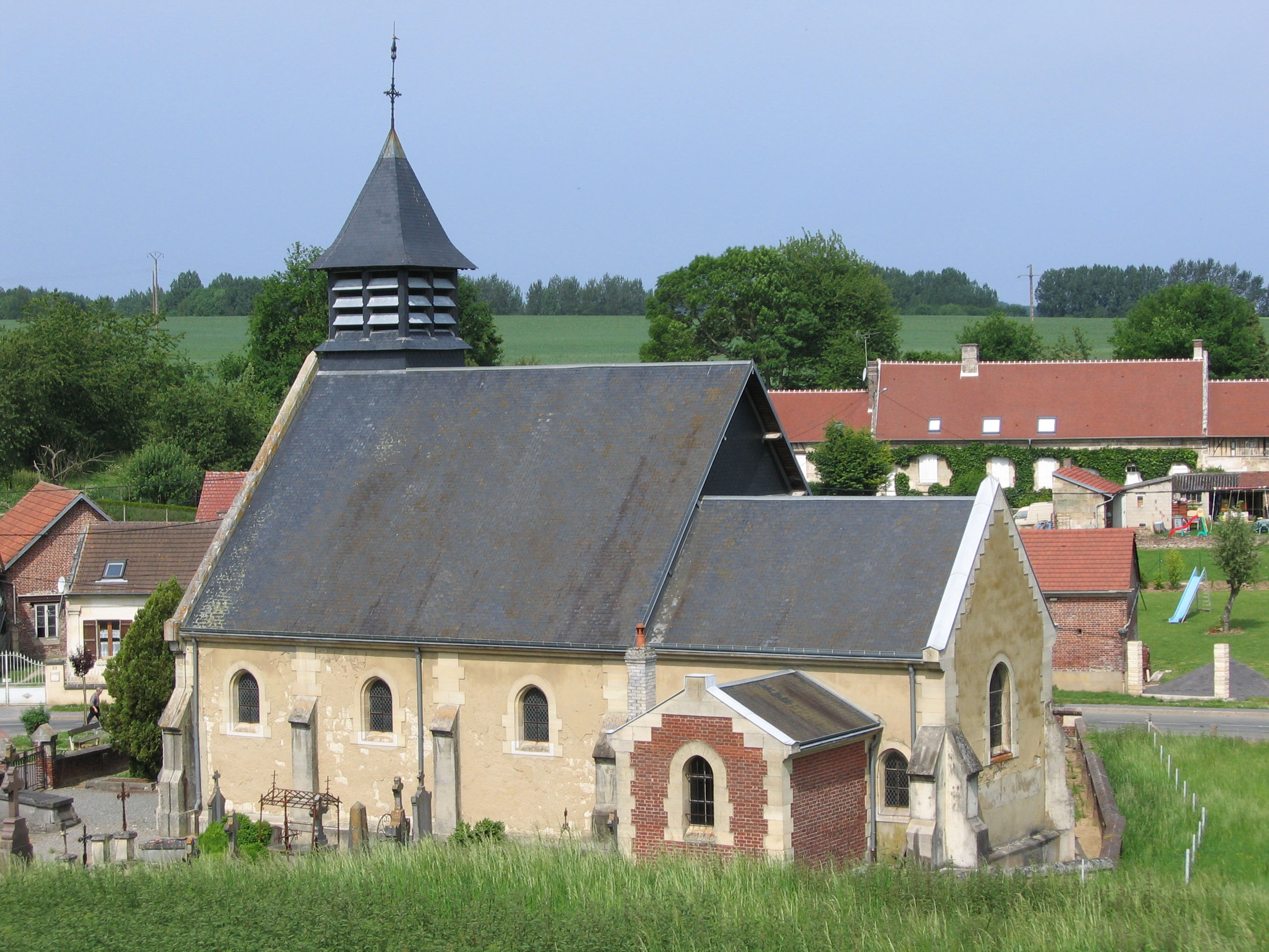 Église de Cannectancourt, Oise, France